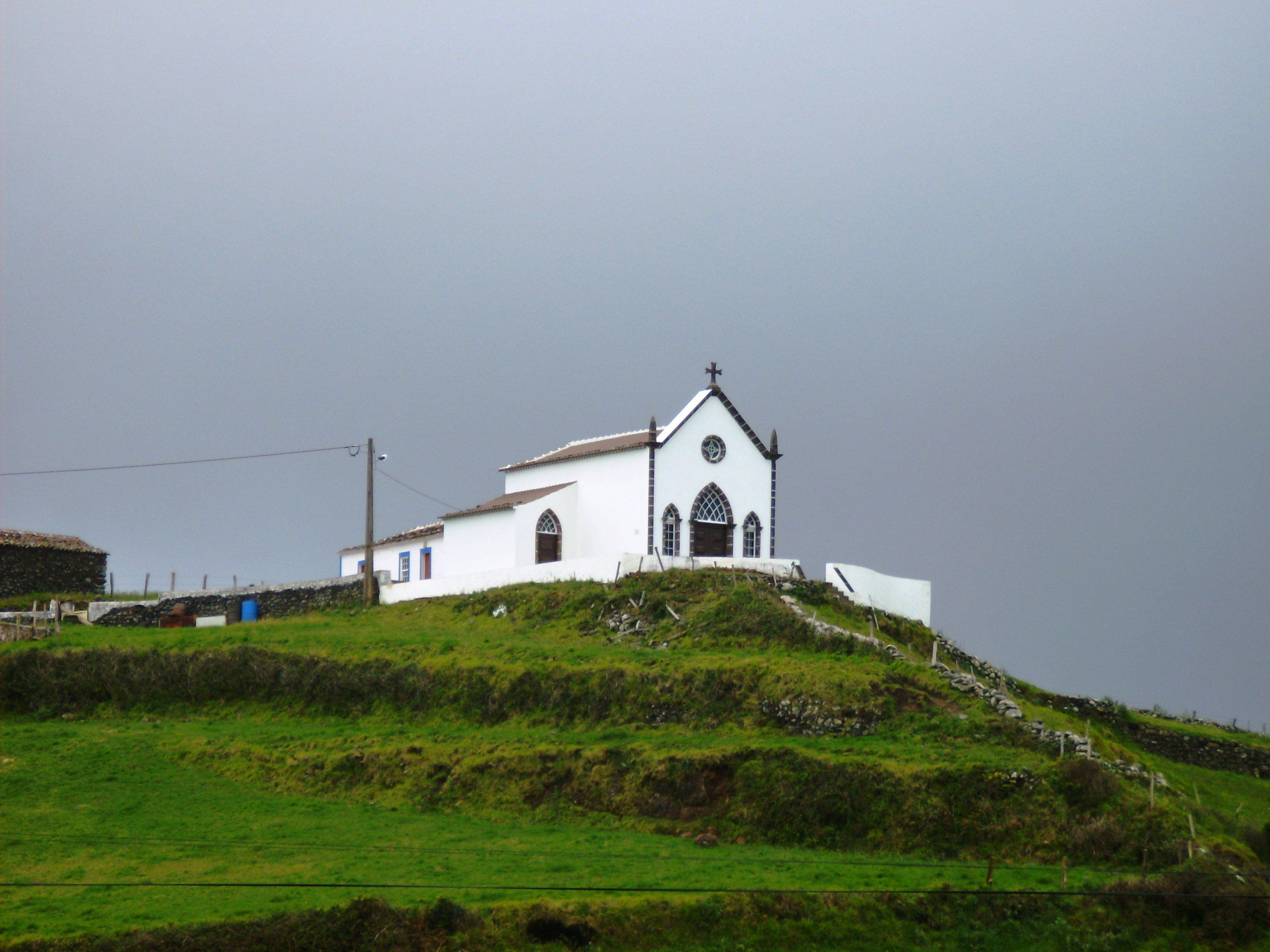 Ermida de Nossa Senhora de Lurdes, Ilha de Santa Maria (Açores), Portugal.